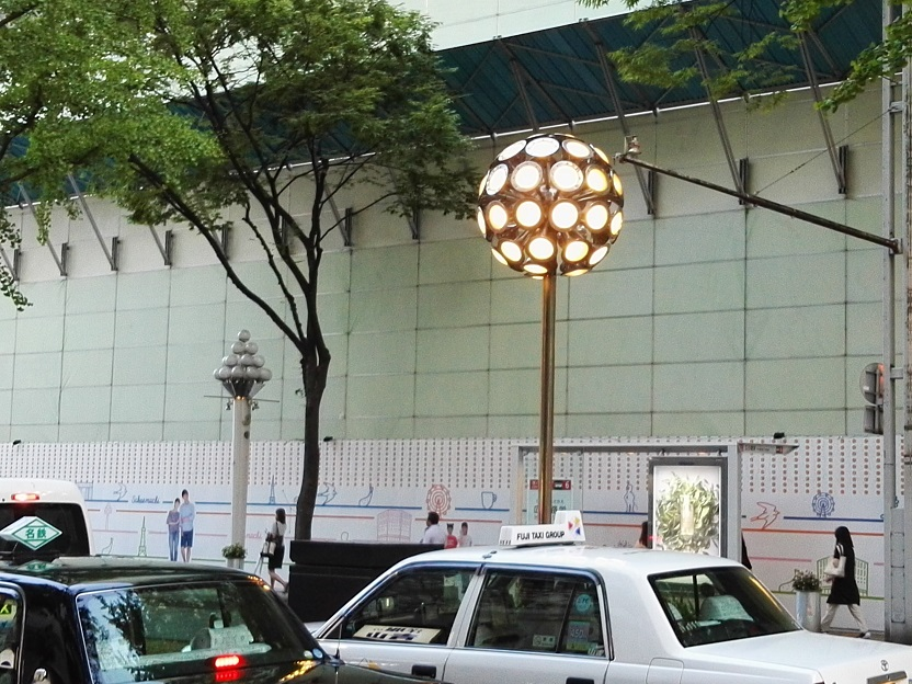 The onion-flower-shaped light at Hirokouji street, Sakae, Nagoya